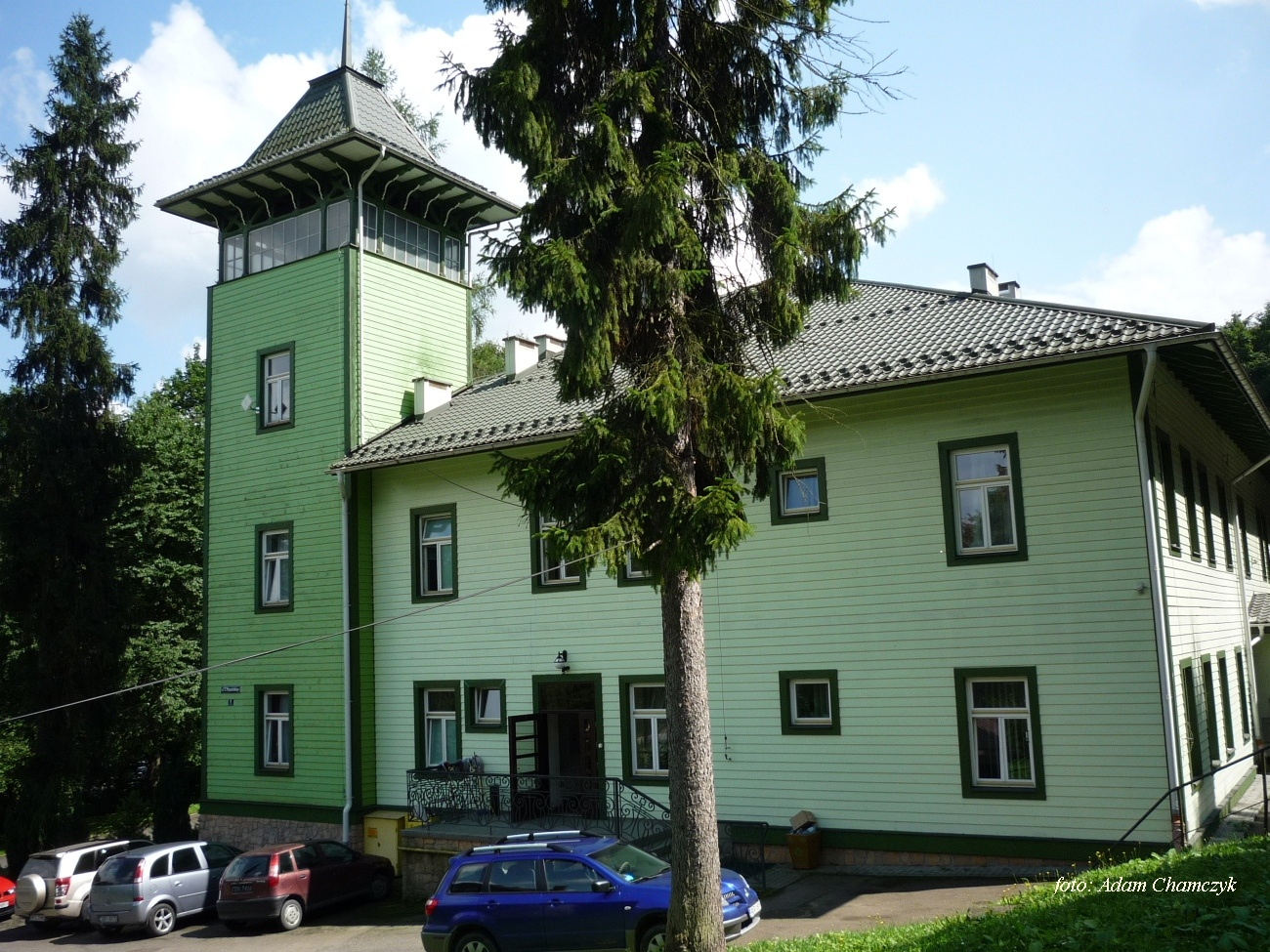 Rymanów Zdrój, ul. Wyspiańskiego 5 - willa "Maria" (obecnie sanatorium), 1890-1910. Unikalna, stylowa architektura wnętrza.